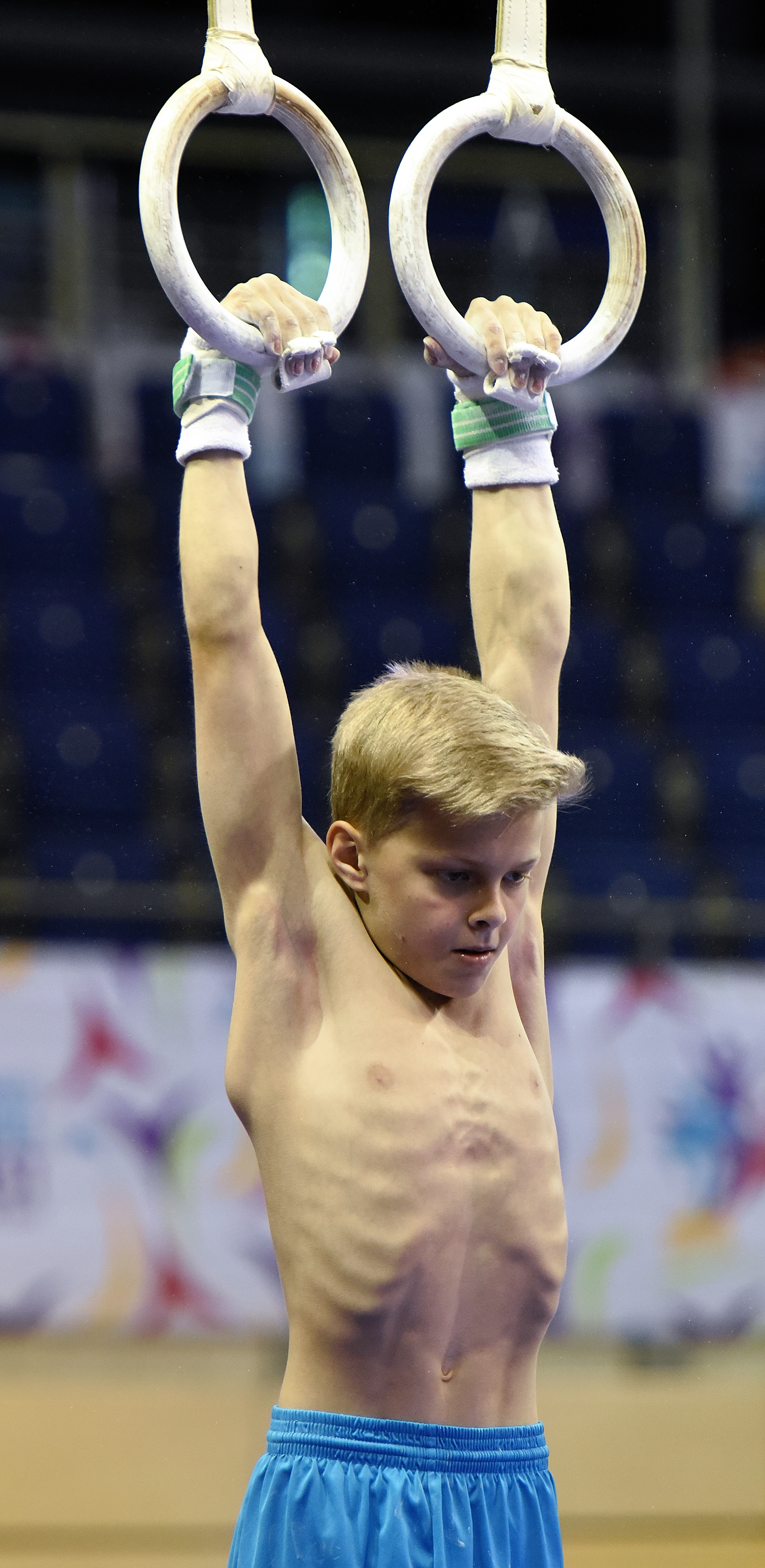 Deutsche Jugendmeisterschaften Gerätturnen männlich Training beim Internationalen Deutschen Turnfest Berlin 2017. Abgebildet: Marc Plieninger.